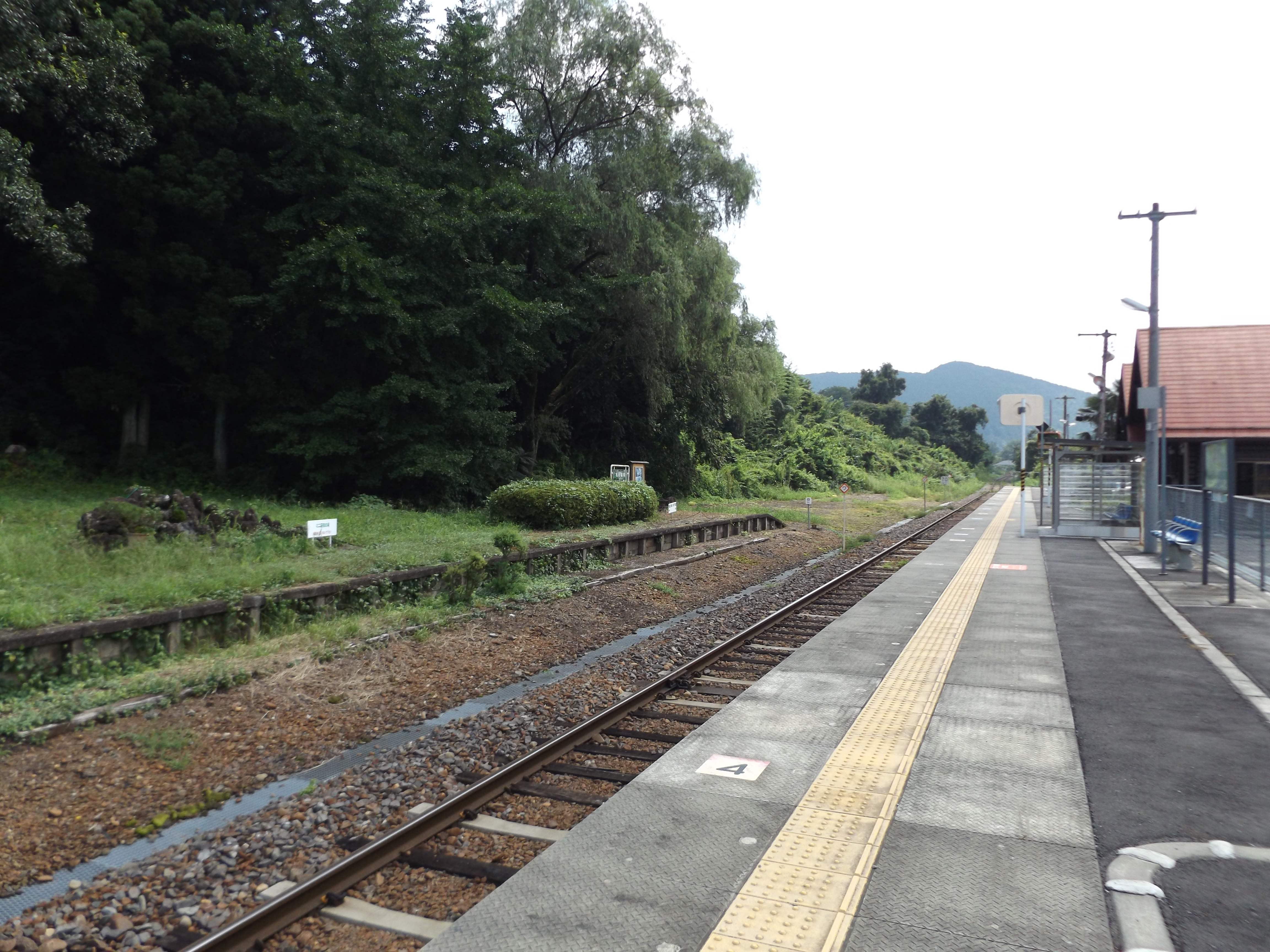 茨城県久慈郡大子町袋田にある東日本旅客鉄道（JR東日本）水郡線袋田駅の構内。 画像左側の使われなくなったホームには「ミニ袋田の滝」がある。